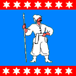 Прапор міста Умань